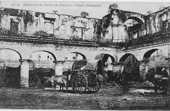 Ruinas del convento de la catedral de Antigua Guatemala en 1900